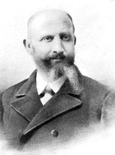 Italian zoologist Pietro Pavesi (1844-1907)